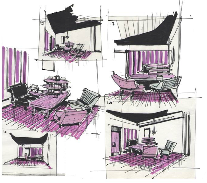 Schizzi di progetto per arredi per un cliente privato